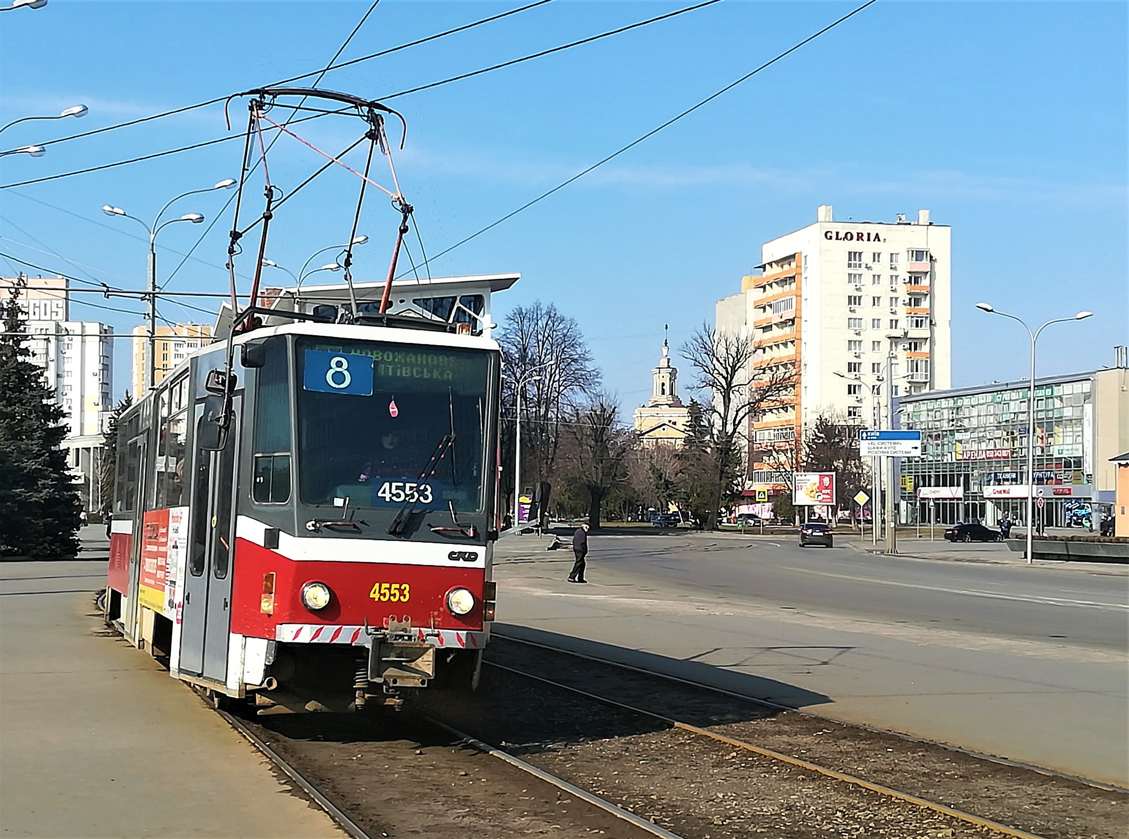 Tramwaj w Charkowie na przełomie lutego i marca 2020 r.